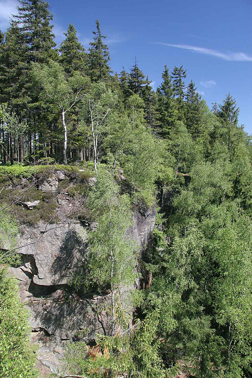 Vyhlídka Skaly Puchacza ve Stolových horách v Polsku autor:Zp